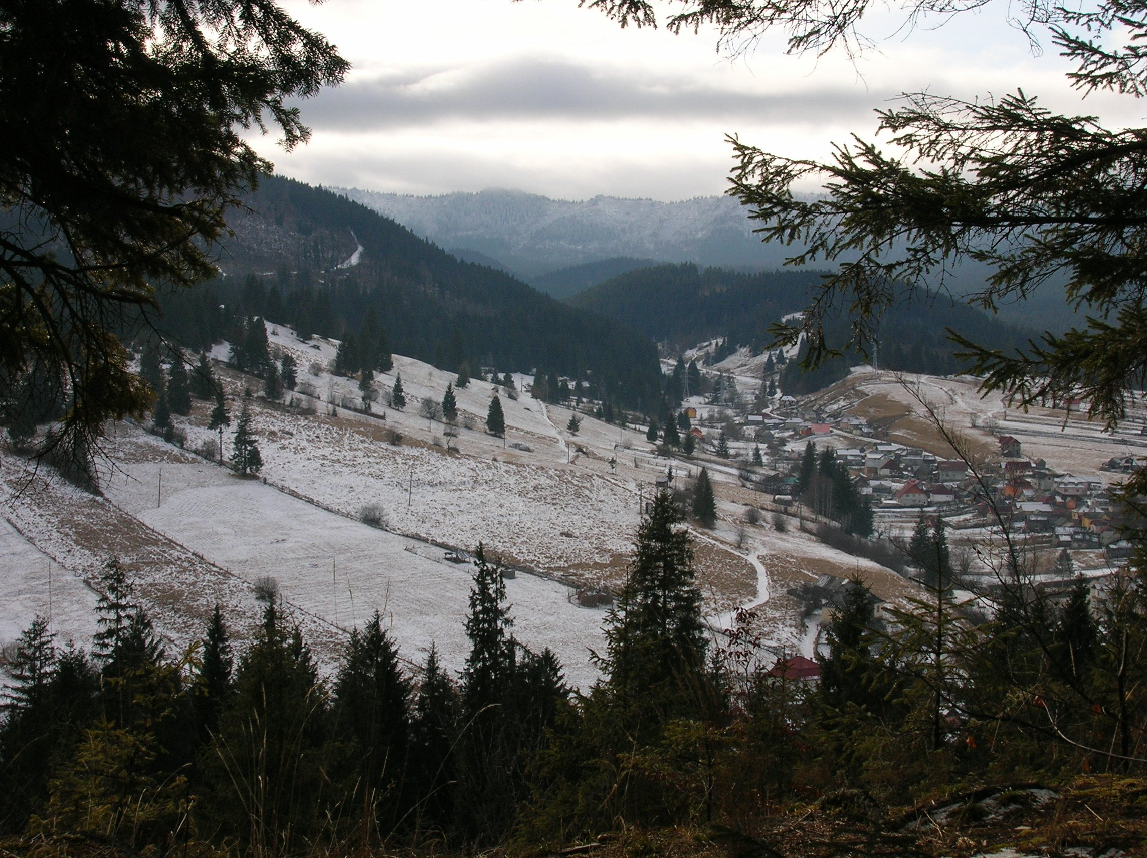 Intrarea DJ128 dinspre Borsec